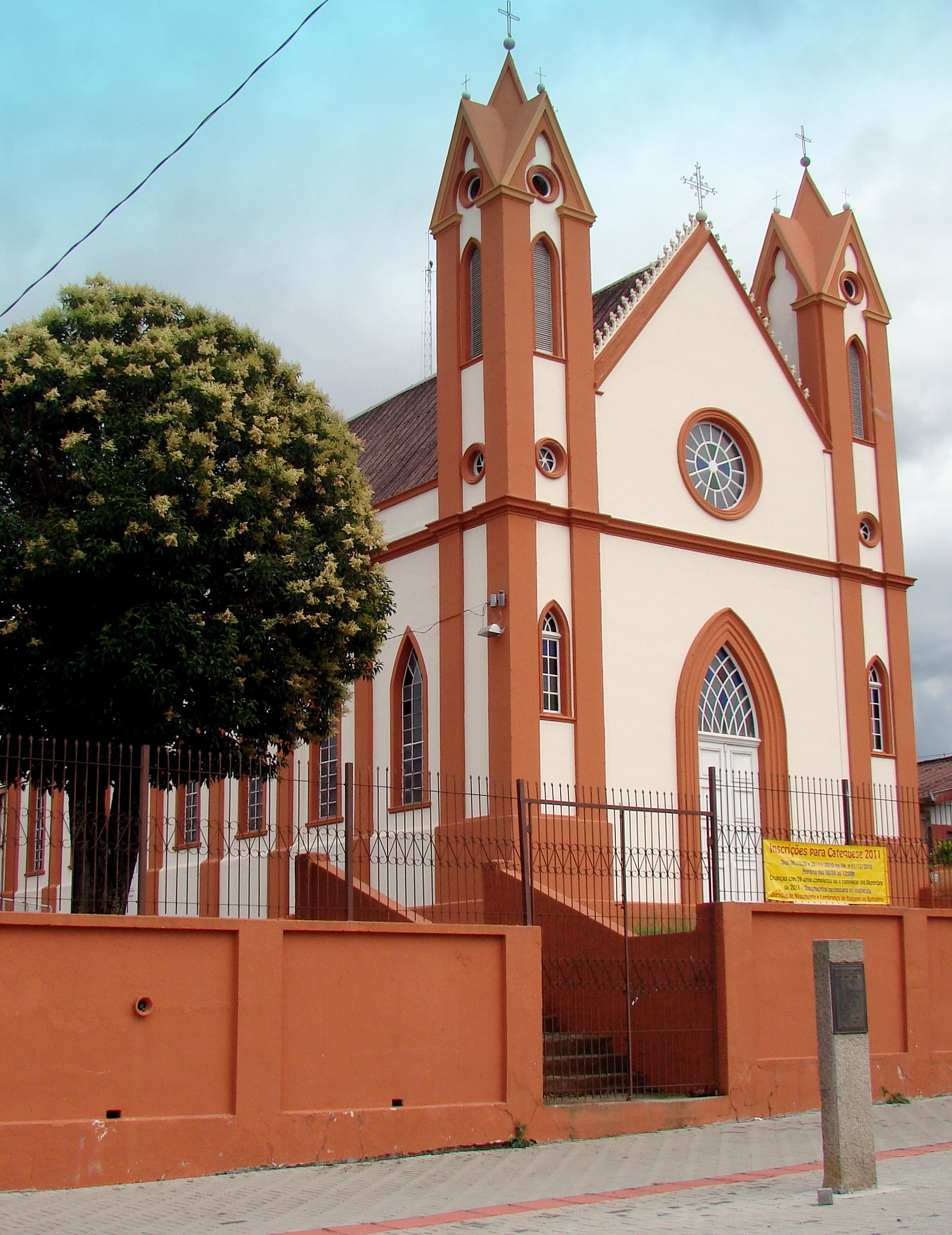 Igreja Matriz Senhor Bom Jesus dos Passos em Piraquara (Grande Curitiba), Paraná, Sul do Brasil.